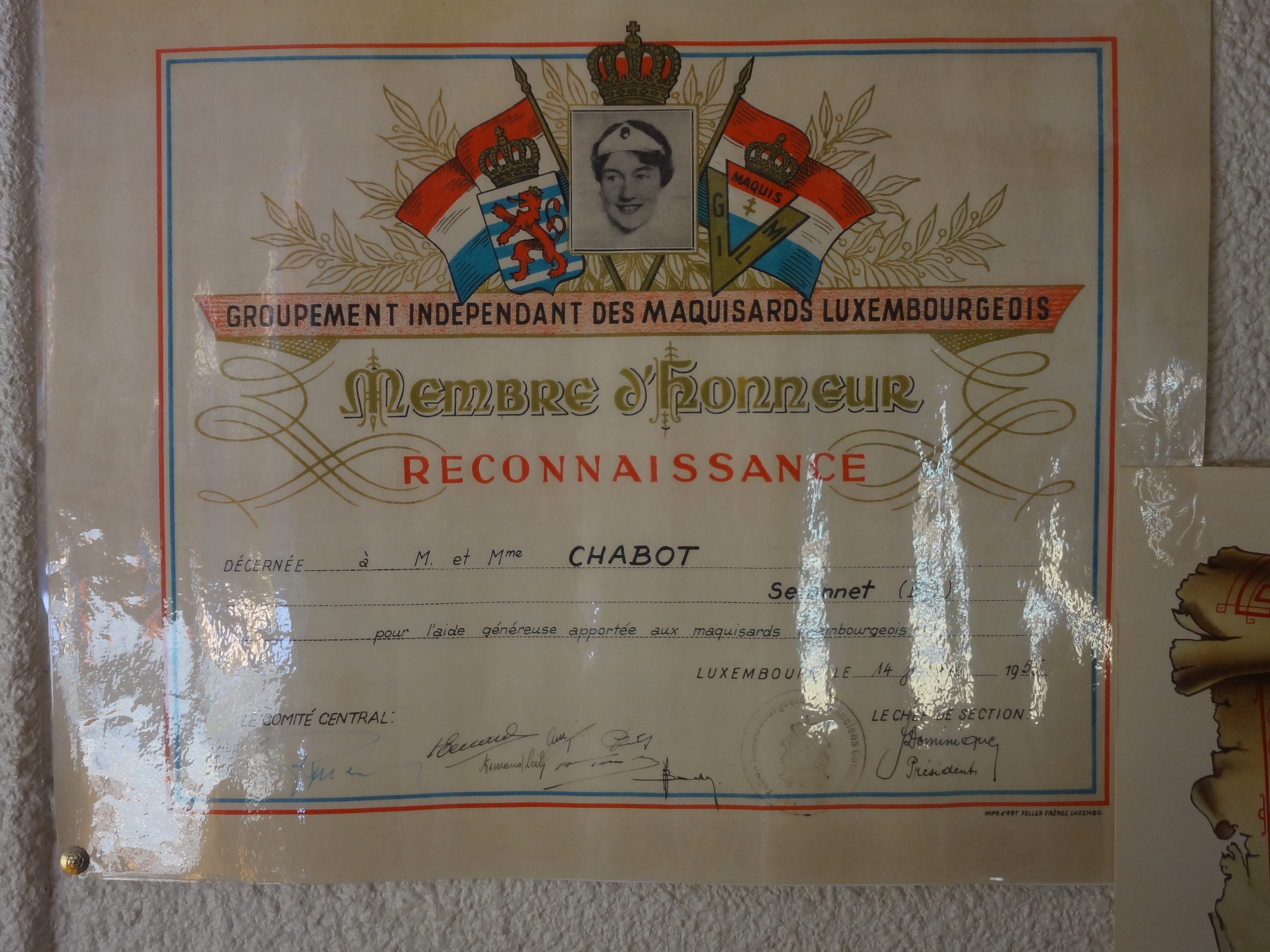 Diplôme d'honneur remis par le gouvernement du Luxembourg à une habitante de Selonnet pour l'aide apportée à des maquisards luxembourgeois